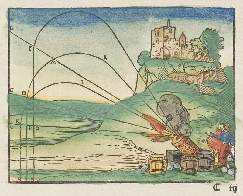 Original image description from the Deutsche Fotothek Ballistik & Kanone